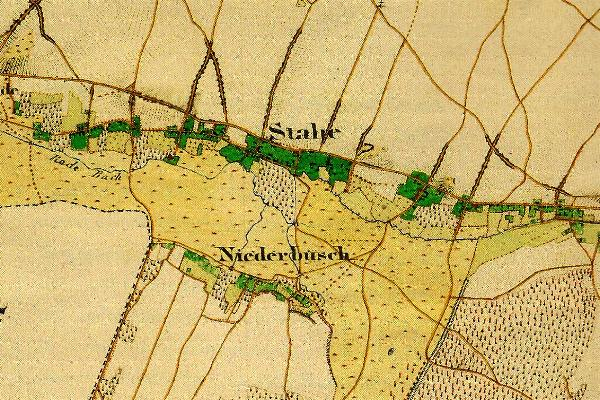 Preußische Kartenaufnahme 1846 -Uraufnahme- (Gangelt)